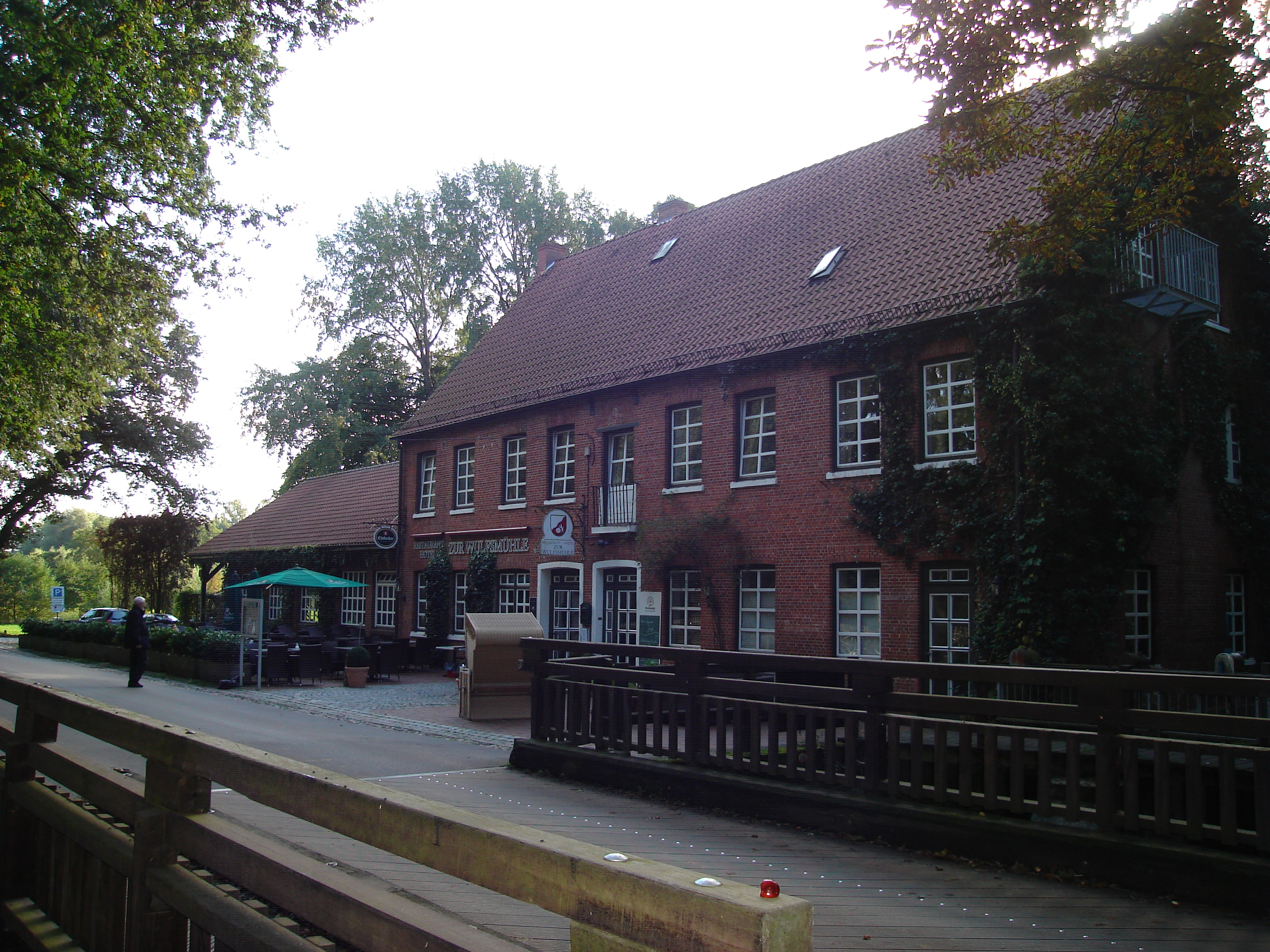 Wulfsmühle an der Pinnau in Schleswig-Holstein